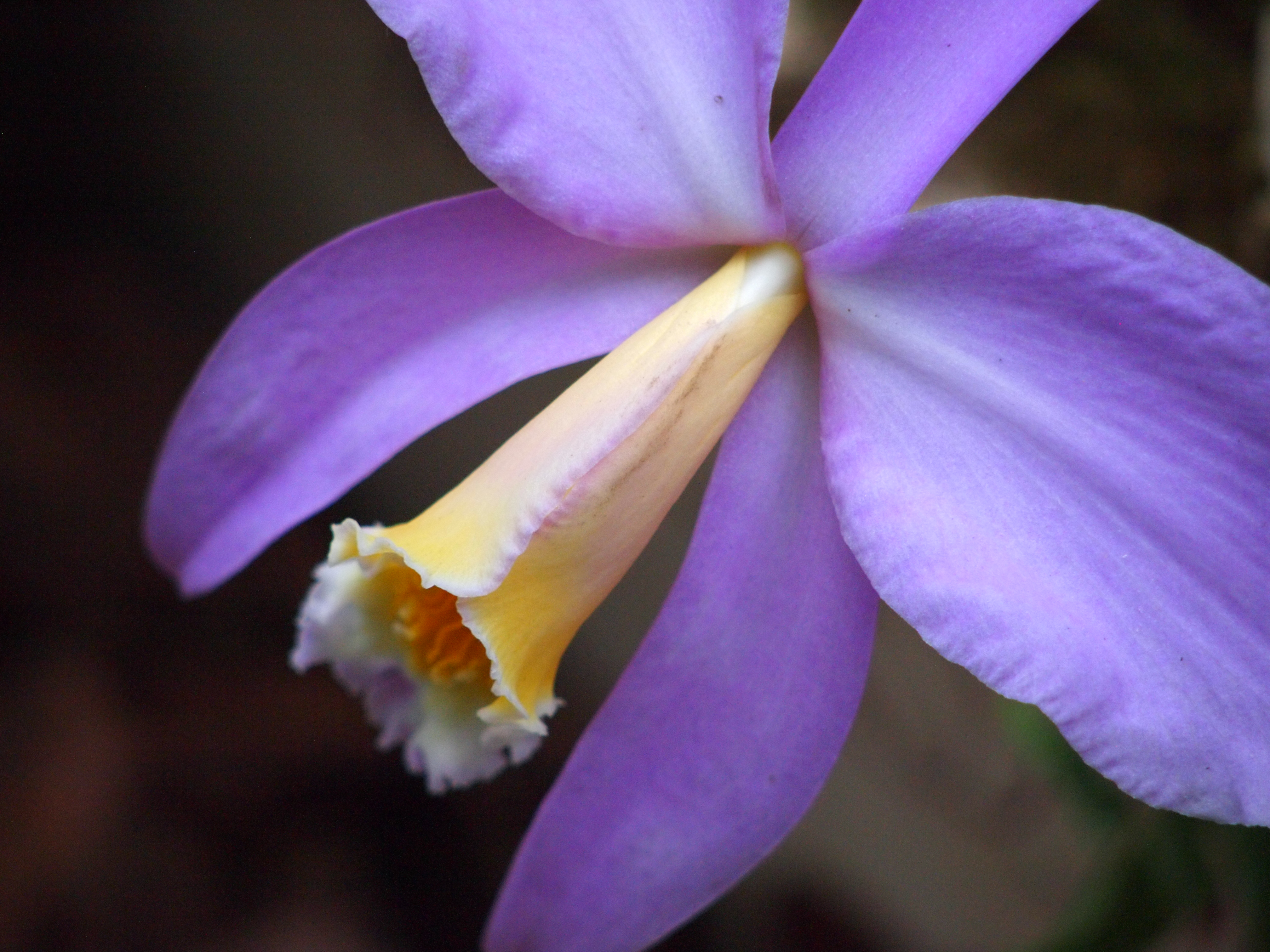 Cattleya jongheana syn. Laelia jongheana